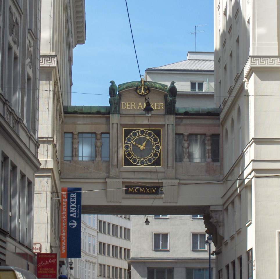 The Anker clock (1914) designed by Franz Matsch; Hoher Markt, Vienna, Austria